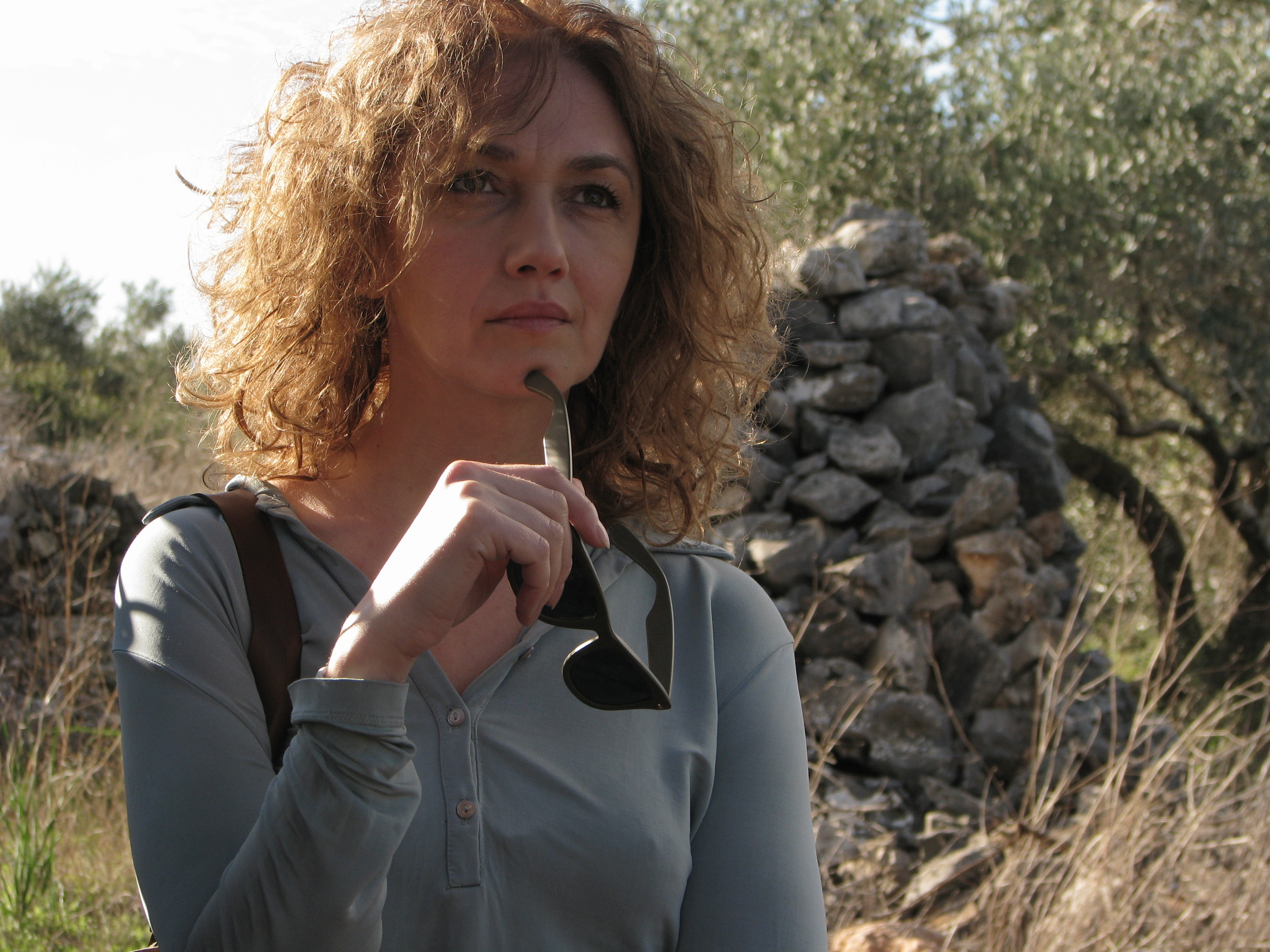 Yevgeniya Dodina מתוך "לא רואים עליך" (2011) סרטה של מיכל אביעד. צילום: קלמית אשכנזי.